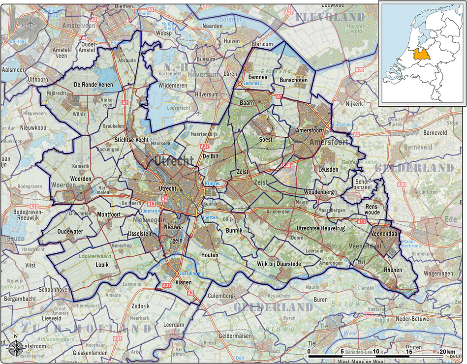 Kaart van de Nederlandse provincie Utrecht, met gemeentegrenzen per 2012 en impressie van het landschap. Referentie-ondergrond (kustlijn, steden, wegen) gerasterd uit de OpenStreet Map OSM. Inhoud is beschikbaar onder de Creative Commons Attribution-ShareAlike 3.0 license. Referentie-ondergrond op water bewerkt vanuit Gebruik is vrij met bronvermelding NLR en ESA. Vectorgrenzen van gemeenten op basis van het vrij te gebruiken geo-bestand van het CBS. Hoogte-aanduidingen (reliëf) gerasterd uit de AHN Viewer ( gebruik is vrij met bronvermelding (c) AHN, Overige kenmerken op de kaart: eigen tekenwerk.